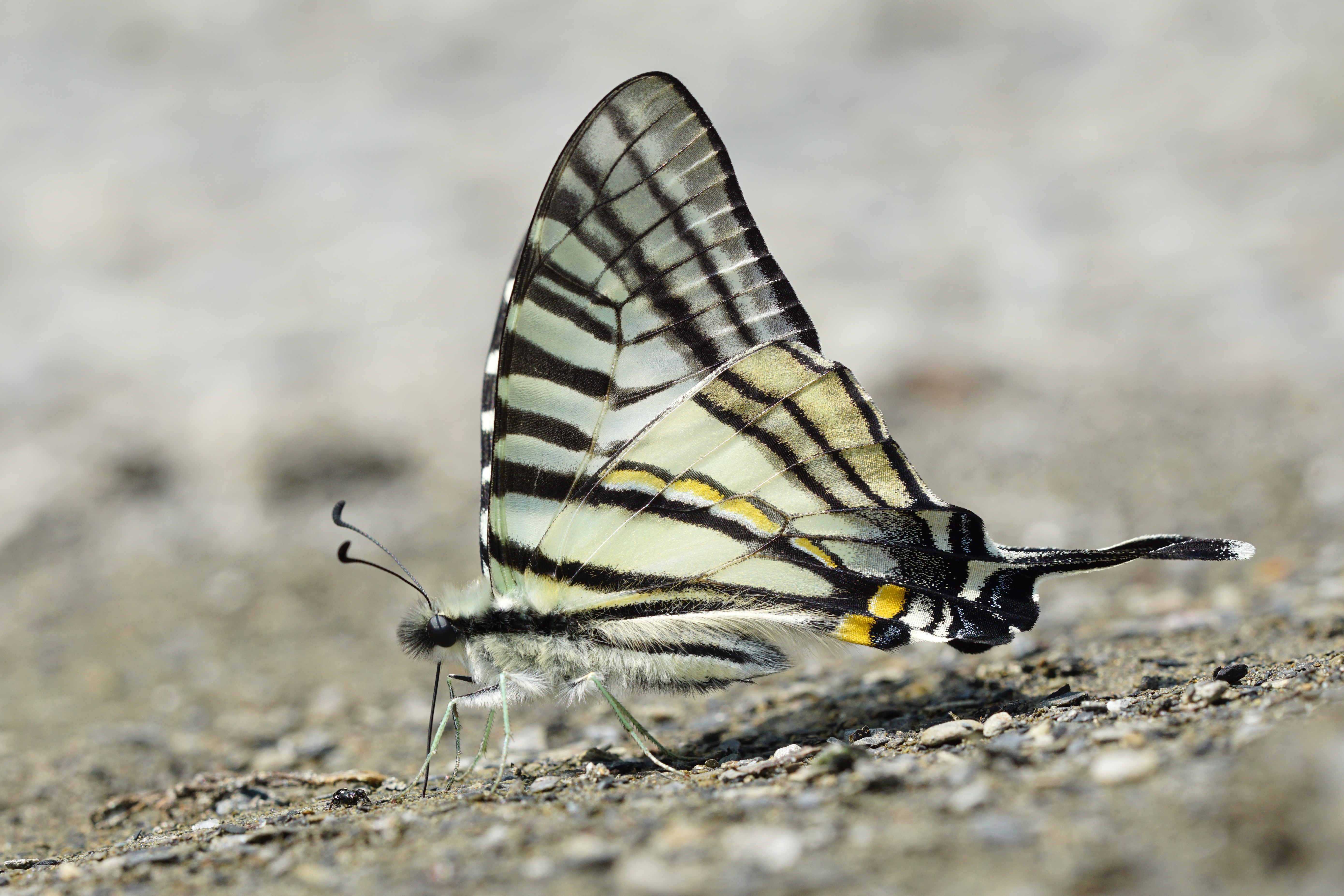 劍鳳蝶 Pazala eurous asakurae